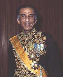 جمشید آموزگار